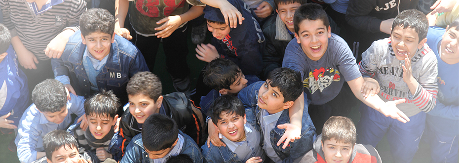 مجتمع اموزشی مهرتابان / دبستان پسرانه